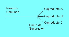 aquí les muestro un pequeño ejemplo de cómo sería una distribución de producción conjunta.